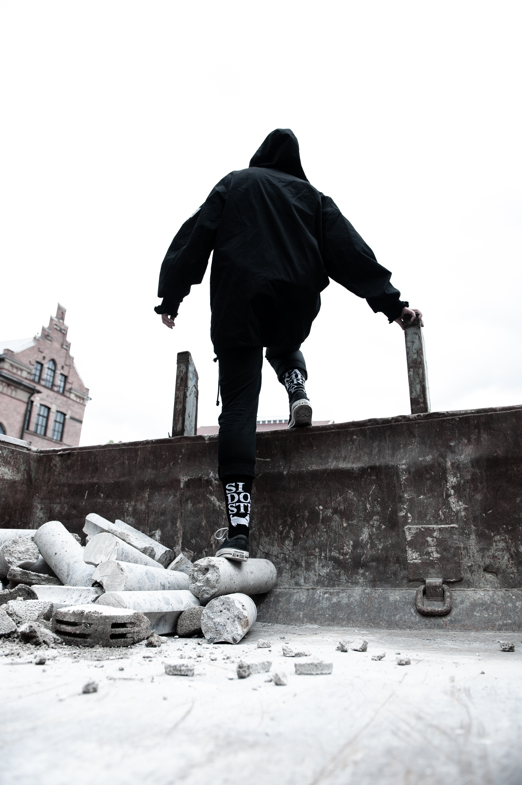 2018 julkaistiin Sidoste Signature sukkasarja joista löytyy myös kuvassa näkyvät Tampere sukat. Sukkien suunnittelijana toimi H23 Agency:llä Miiro Seppänen